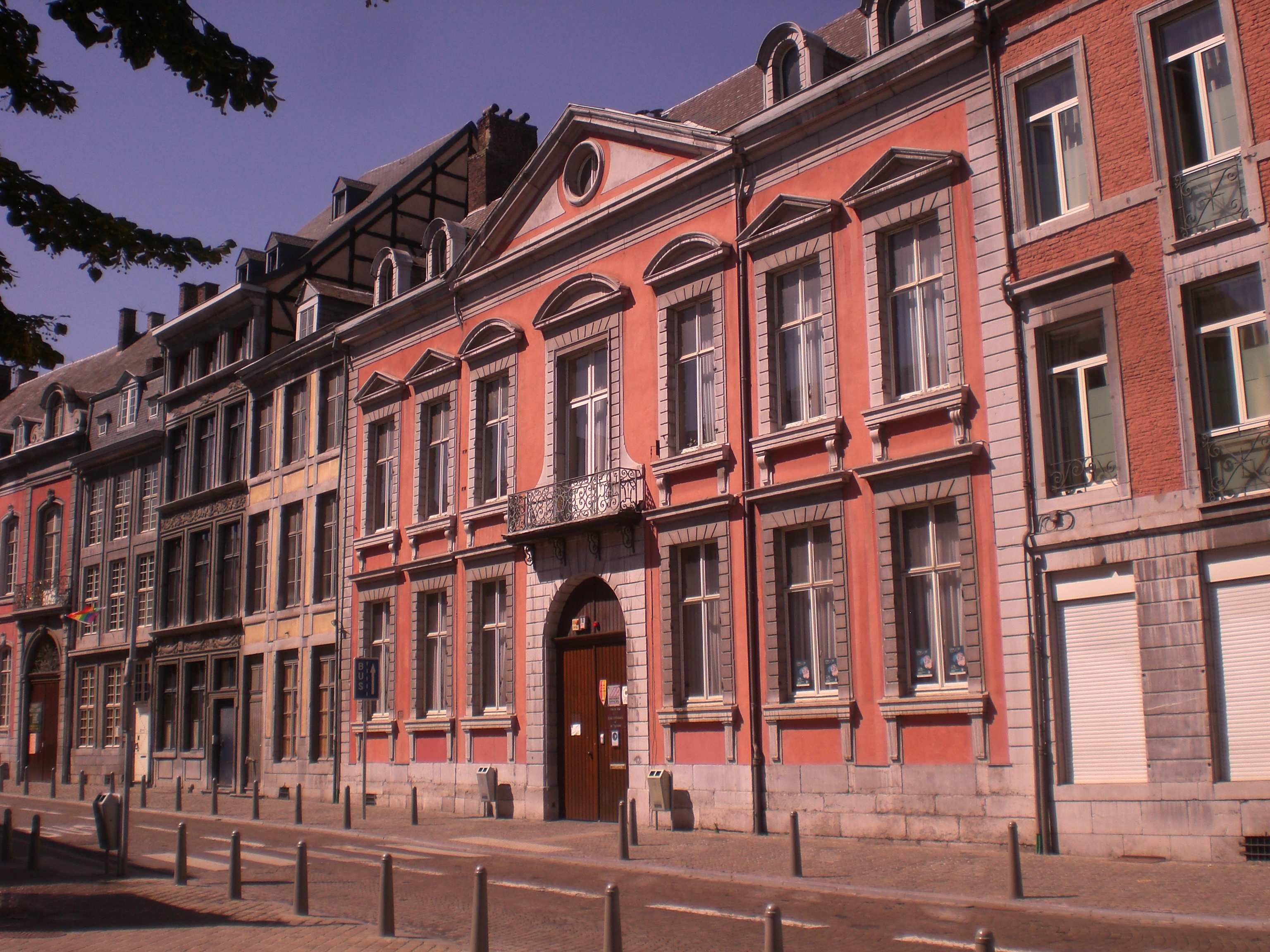 Hôtel de Stockhem Liège